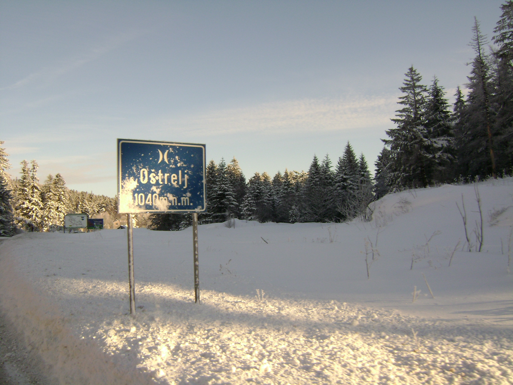 Ostrelj